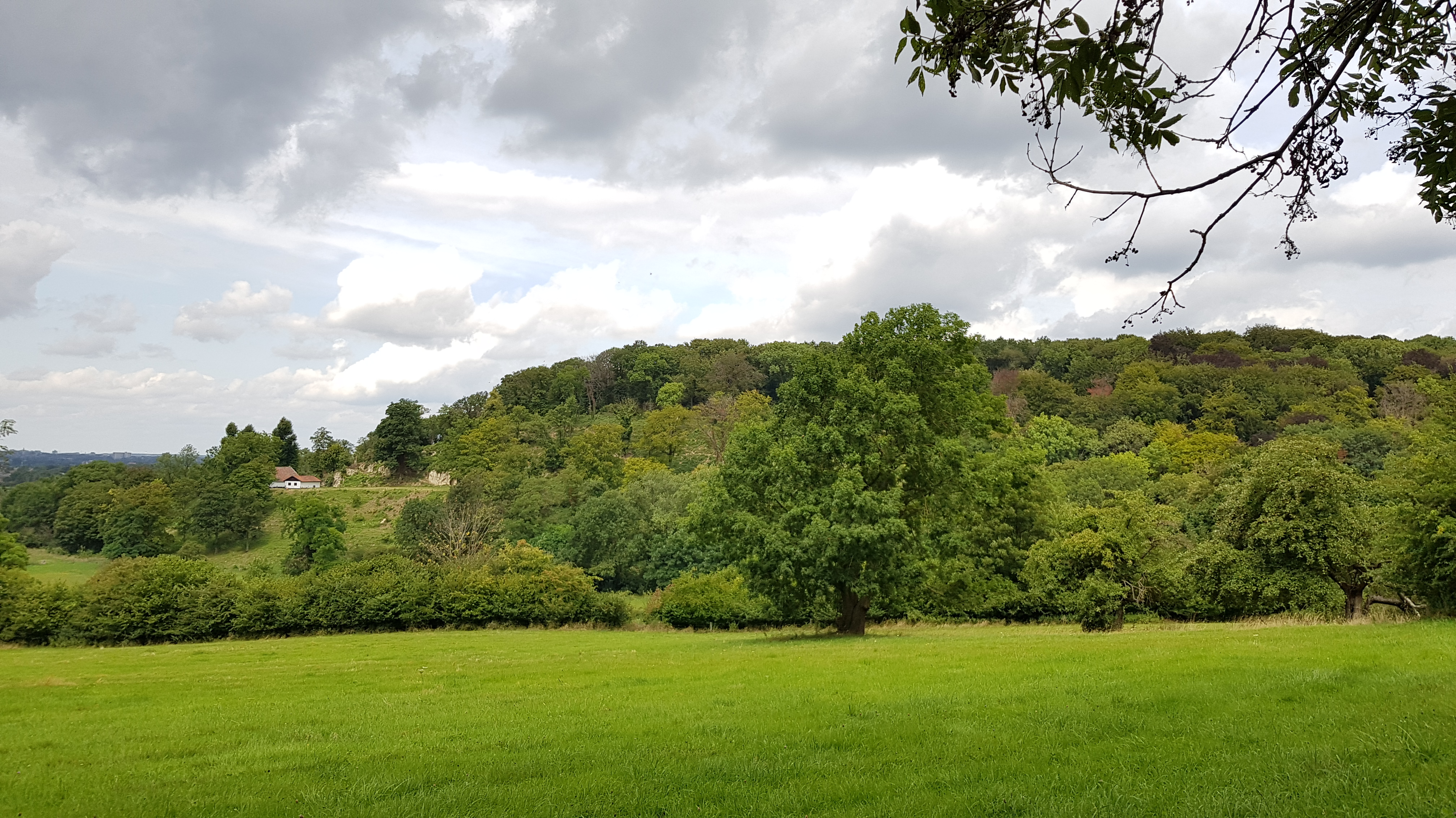 Riesenberg met Dorregrubbe, Gronsveld, Nederland